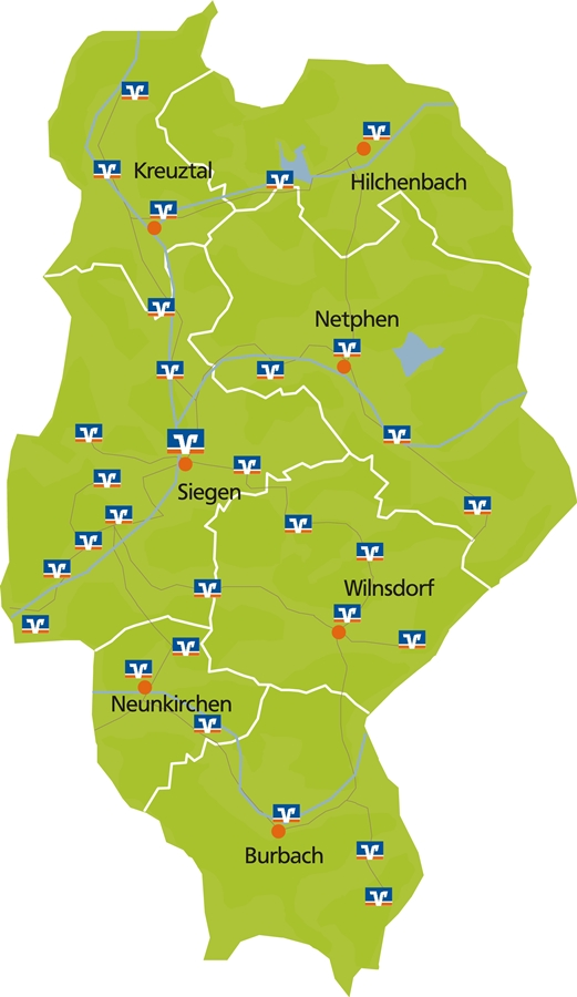 Karte der Servicestellen der Volksbank Siegerland in deren Geschäftsgebiet.